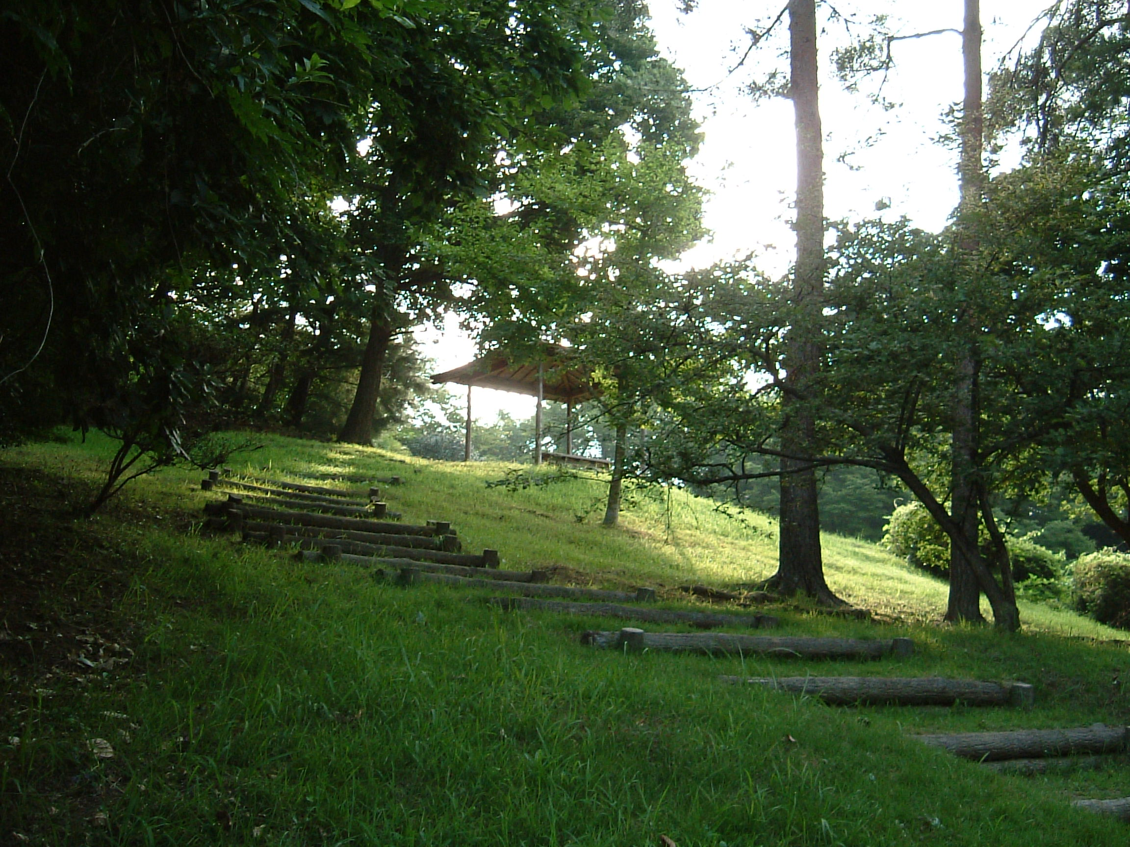 a kitchen midden Minamikouya Hitachi City Ibaraki Pref Japan 南高野史跡公園 (南高野貝塚)